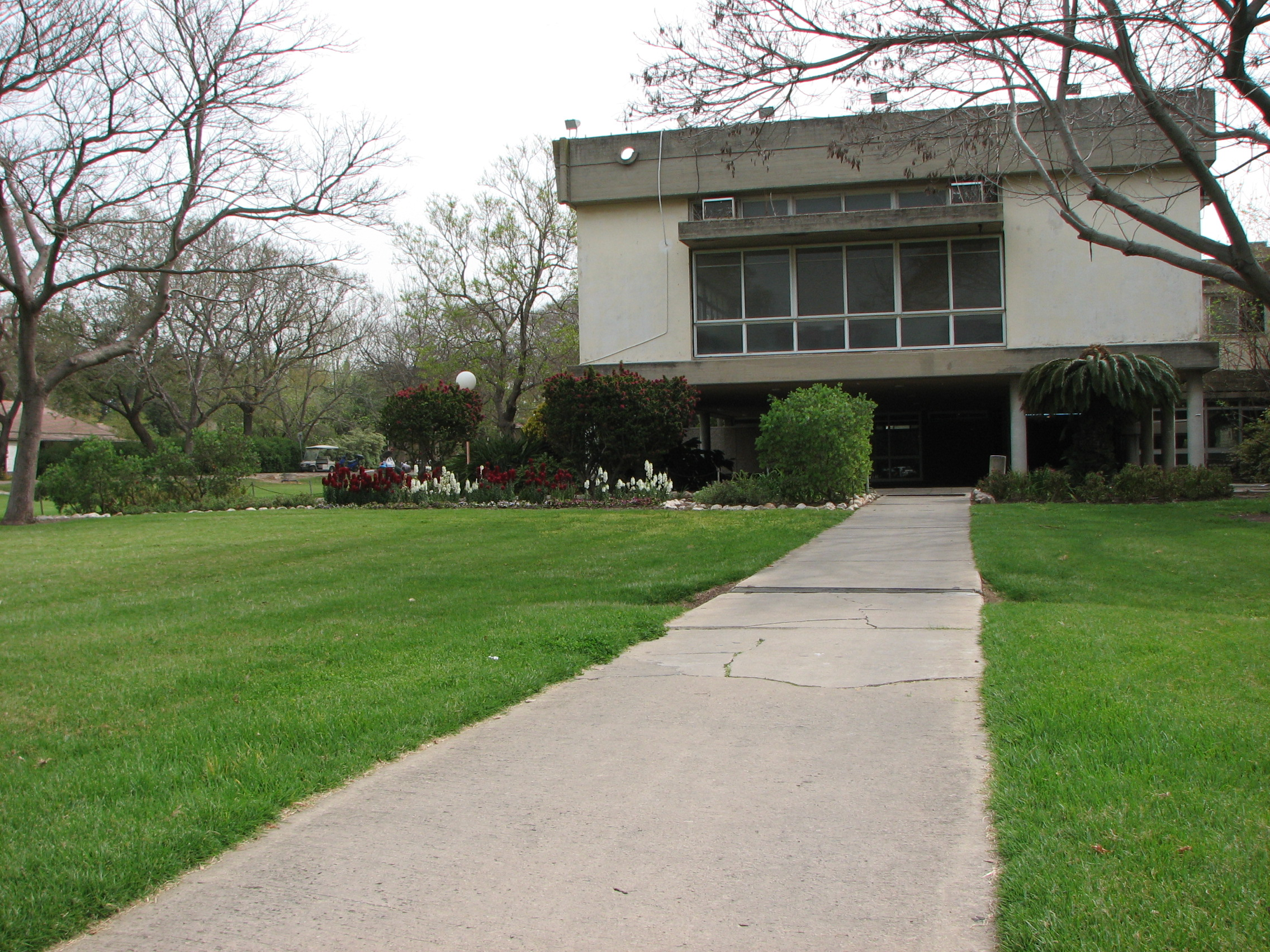 חדר אוכל בקיבוץ לוחמי הגטאות בתכנון האדריכלית נעמי יודקובסקי